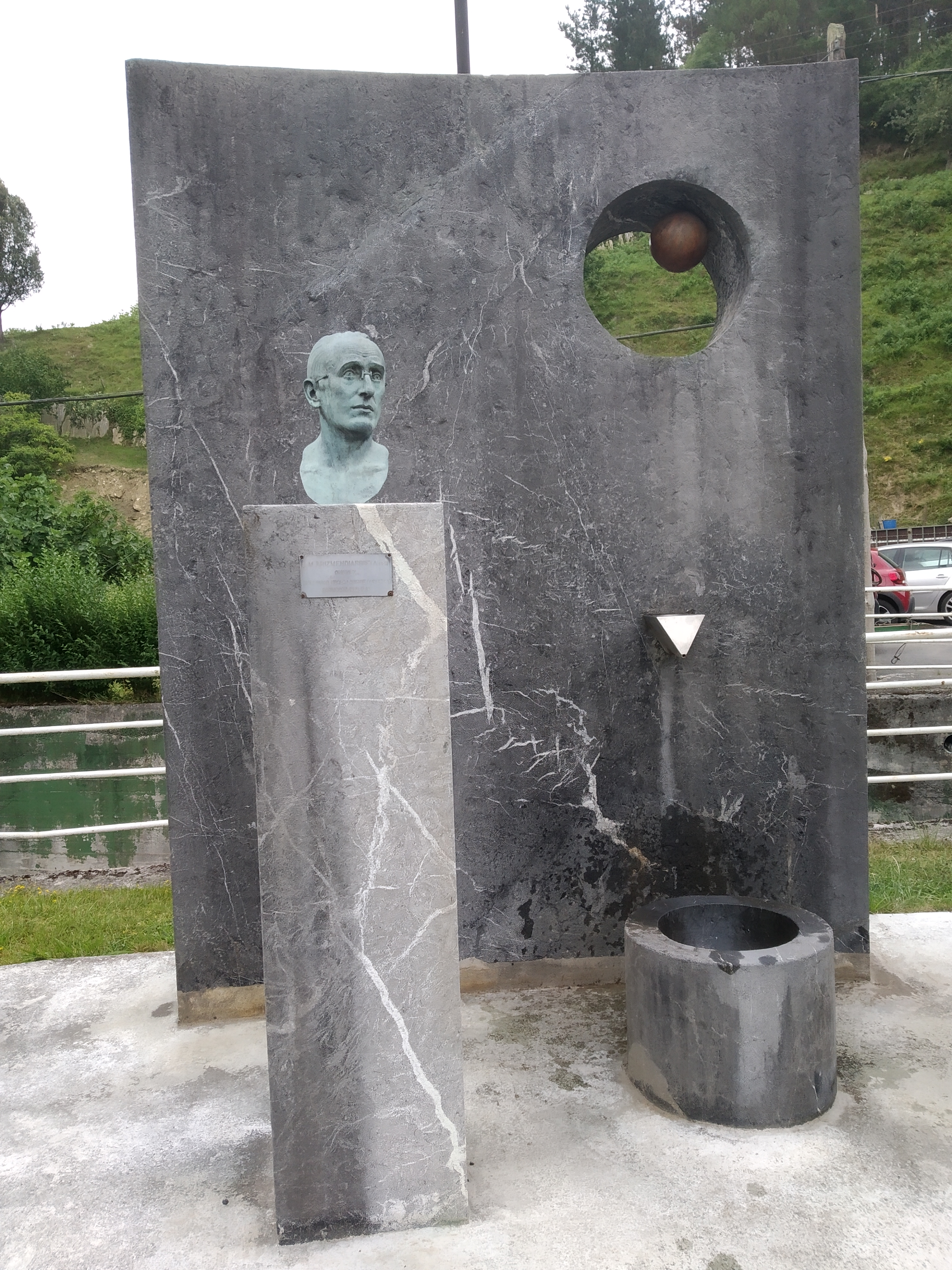 Barinaga, Markina. Lorenzo Askasibar eta Mikel Lertxundiren lana.